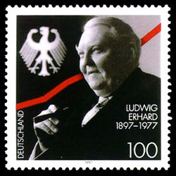 100. Geburtstag Ludwig Erhard